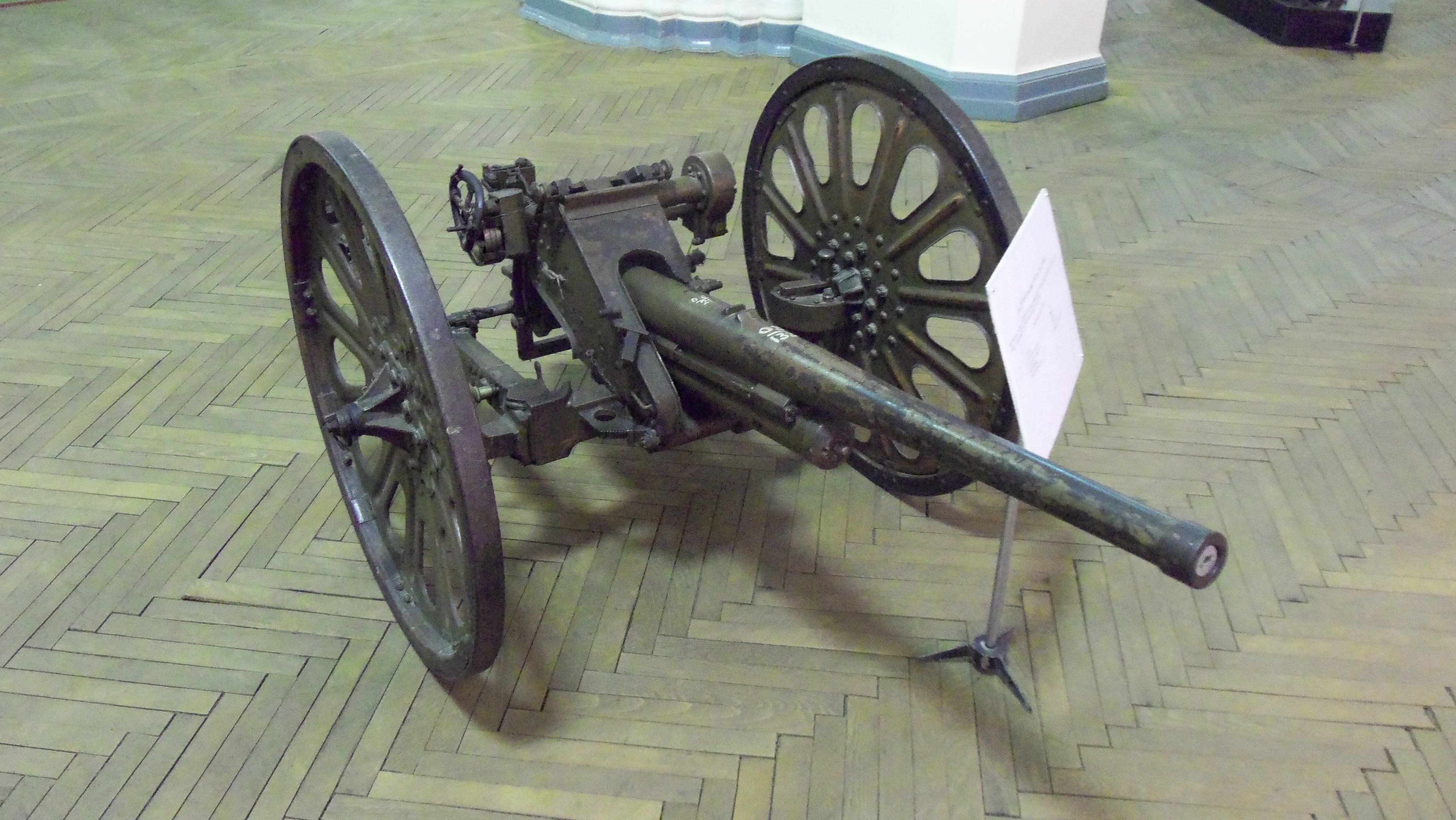 37-мм японская противотанковая пушка обр. 1934 года (2594 год от основания Японии) в Военно-историческом музее артиллерии, инженерных войск и войск связи в Санкт-Петербурге